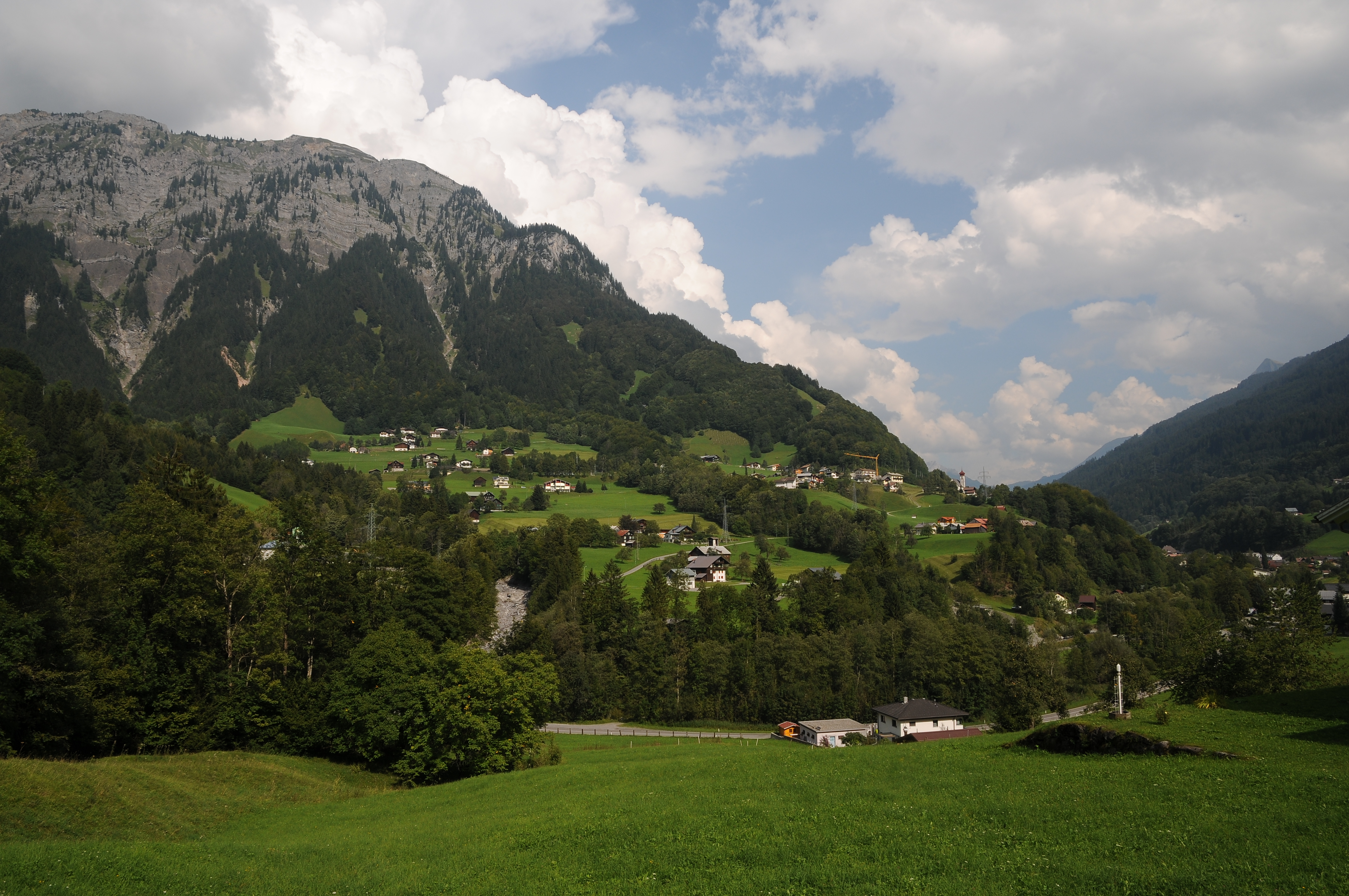 Dalaas, gesehen vom Äußeren Winkel. Der Bach ist die Alfenz.